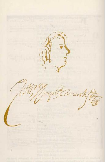 Caricatura del maestro joseph cascante hijo